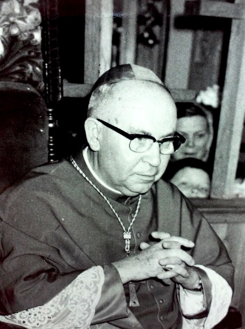 Kardynał Bolesław Kominek podczas wizytacji kanonicznej w kamiennogórskiej parafii pw śś Piotra i Pawła 20.05.1973 r